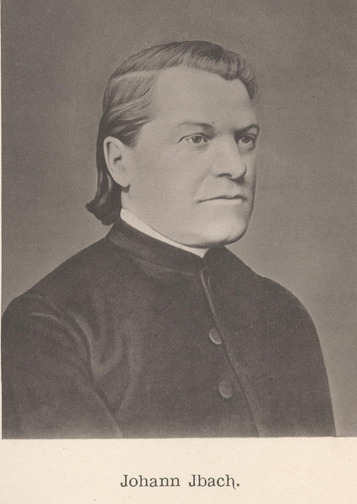 Johannes Ibach, Pfarrer von Villmar, Domherr Limburg, preussischer Landtagsabgeordneter, Buchautor